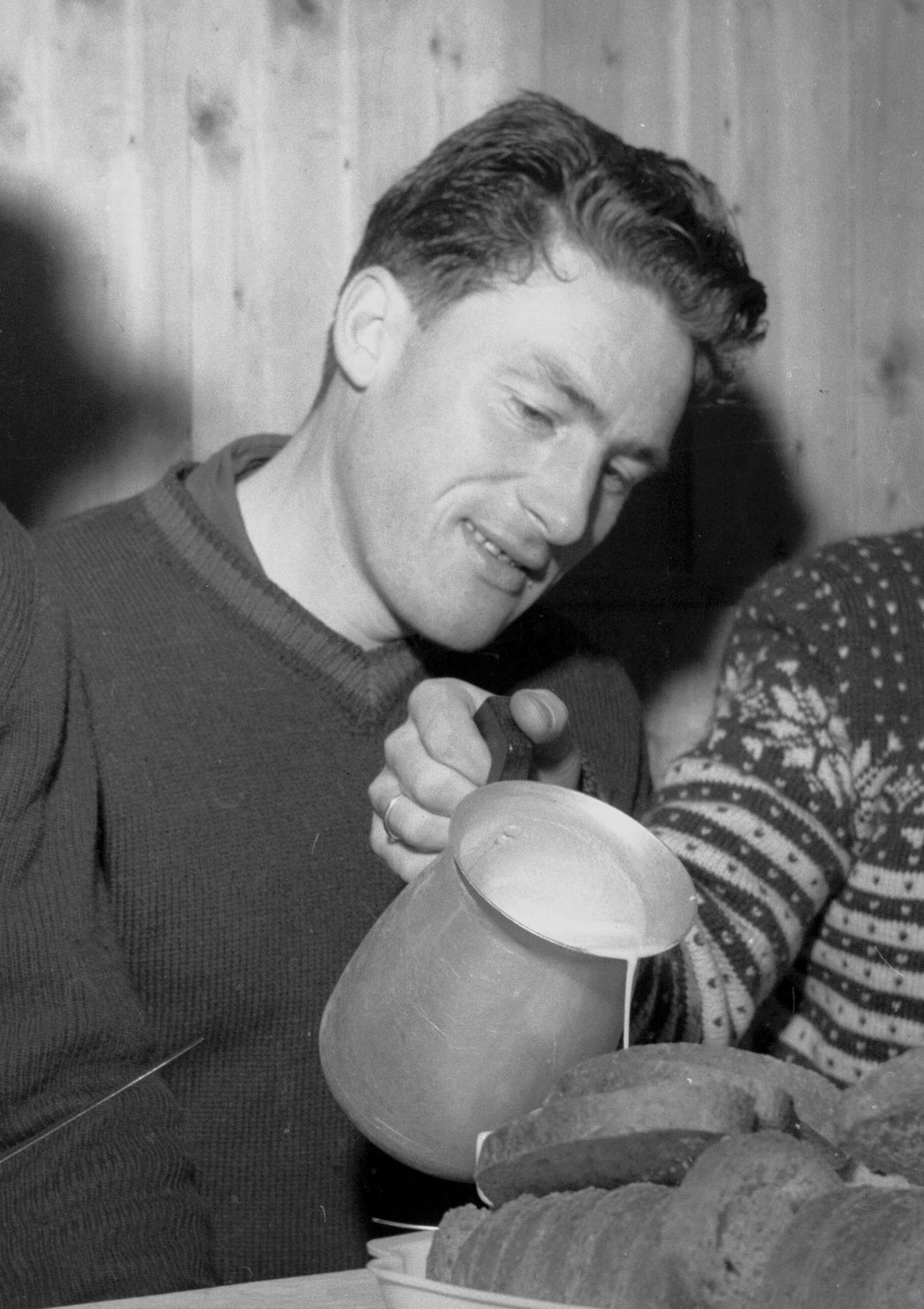 Edvin Landsem, Oslo, Holmenkollen.